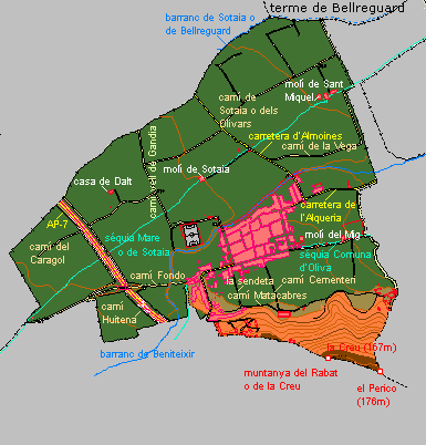 mapa del terme municipal de Rafelcofer: camins, barrancs i altres.